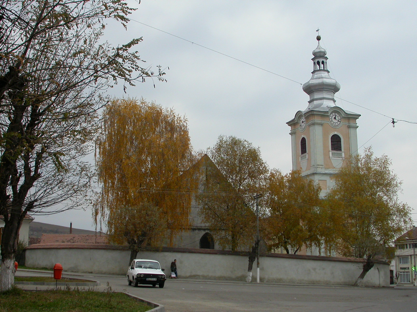 Ansamblul bisericii evanghelice, sec. XV - XVIII